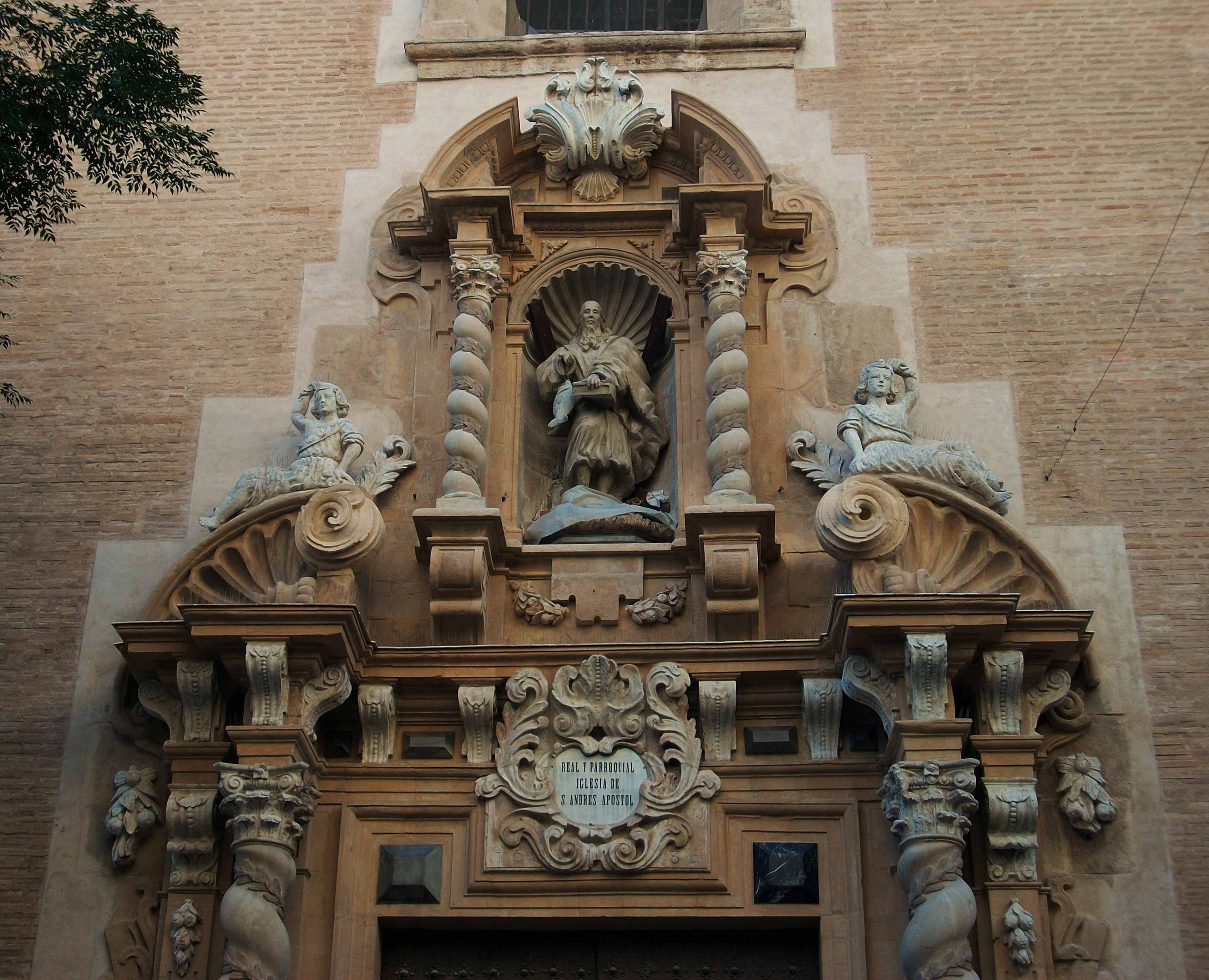 Part superior de la portada de l'església de Sant Andreu o Sant Joan de la Creu, València.